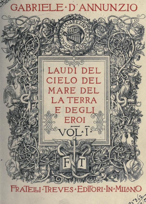 Copertina del primo libro de Laudi del cielo, del mare, del la terra e degli eroi di Gabriele d'ANnunzio, copertina di Adolfo De Carolis, Fratelli Treves editori, 1903